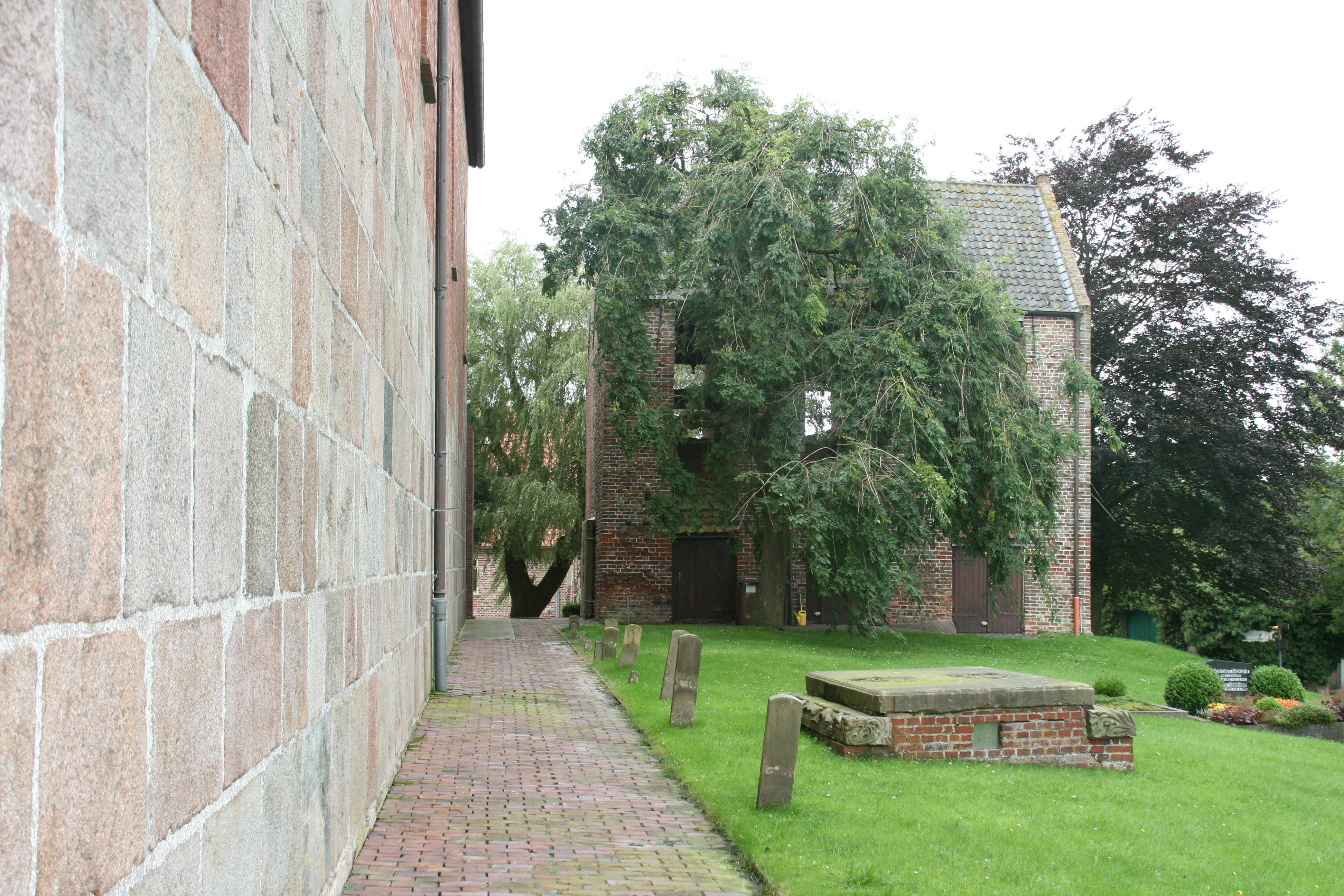 Separater Glockenturm der St. Johanneskirche in Waddewarden